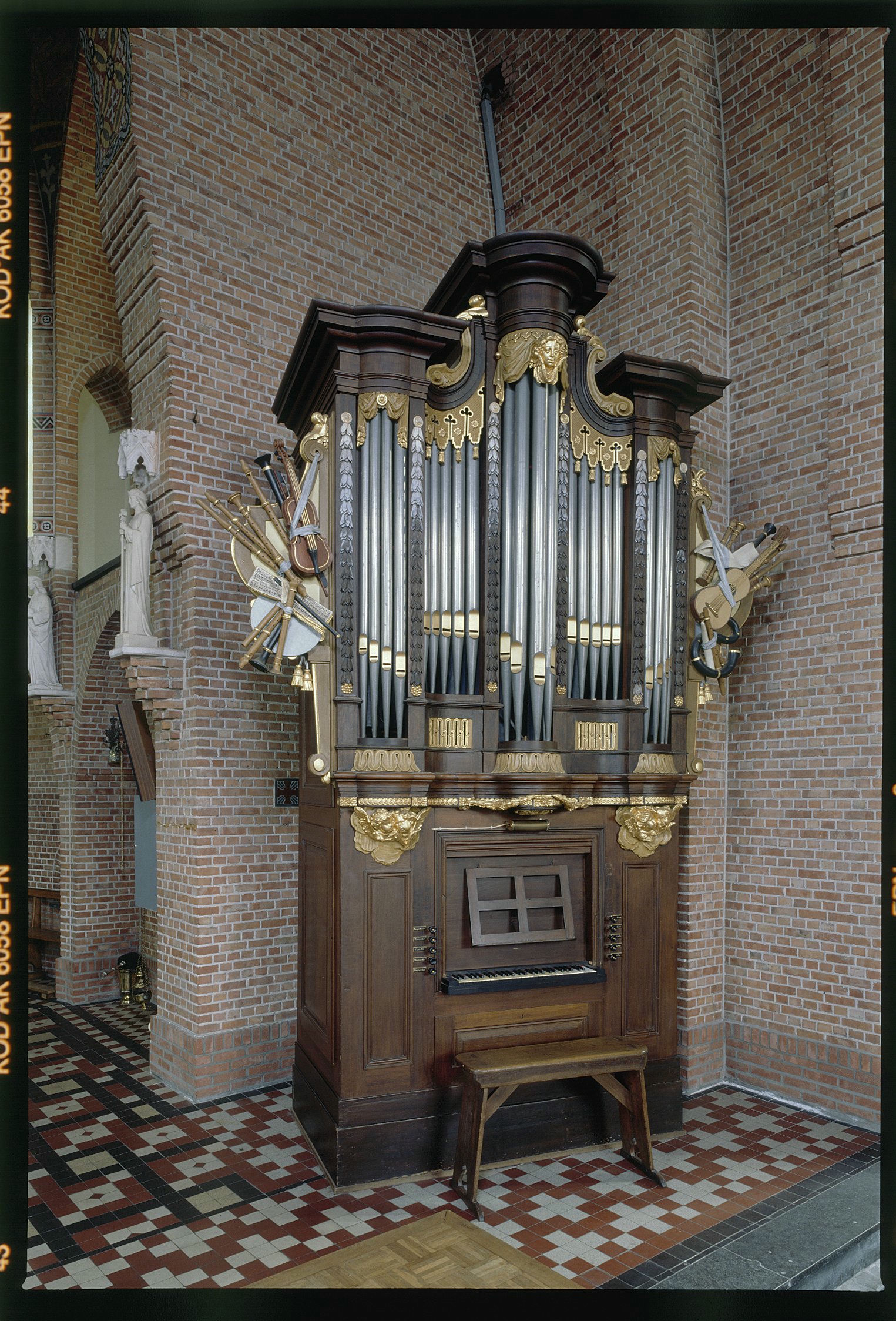 Sint Philippus En Jacobuskerk: Interieur, aanzicht orgel (opmerking: Gefotografeerd voor Het Historische Orgel in Nederland 1769-1790)